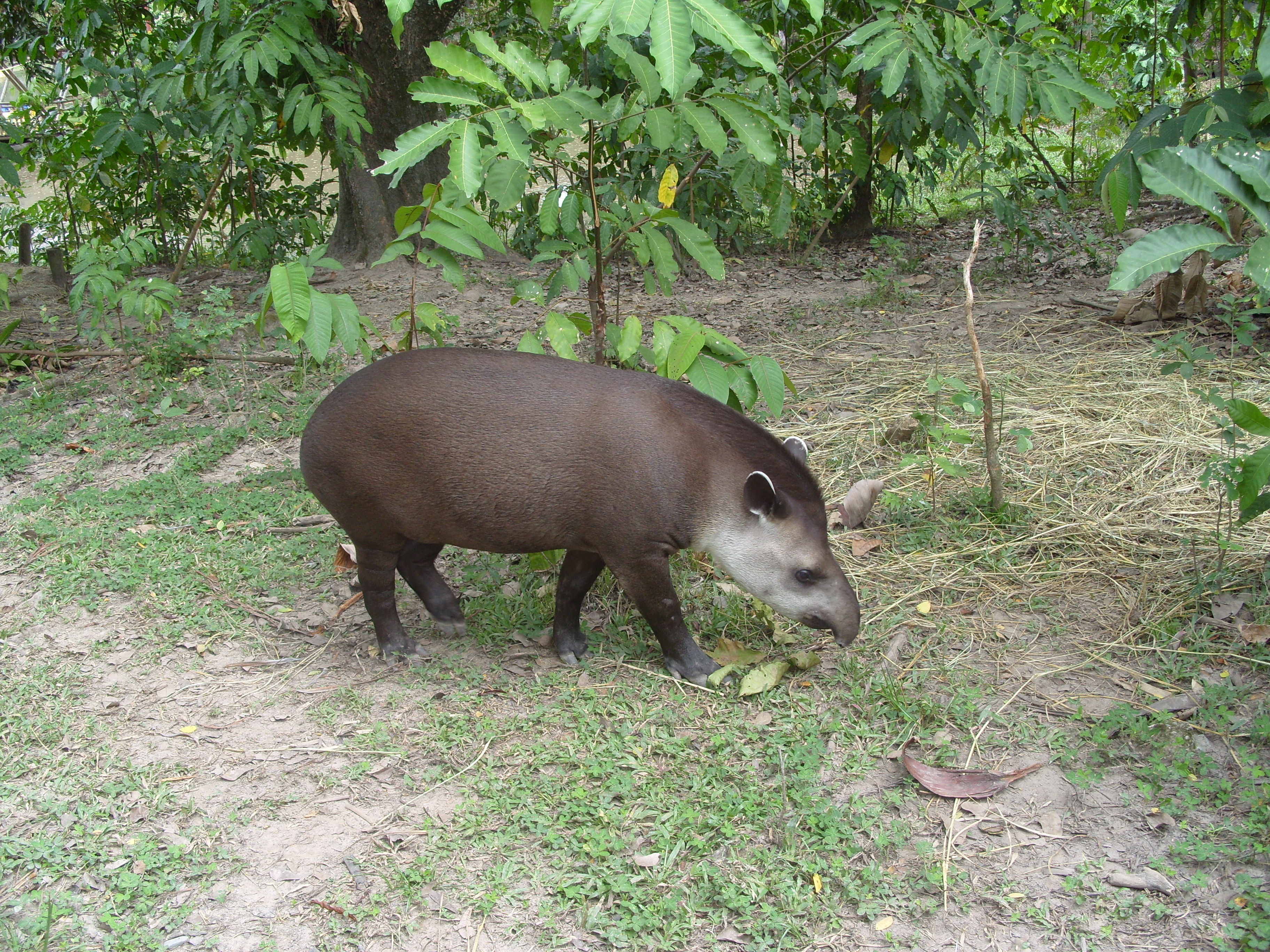 Danta o tapir en el Bio-Parque los Ocarros Villavicencio - Meta, Colombia